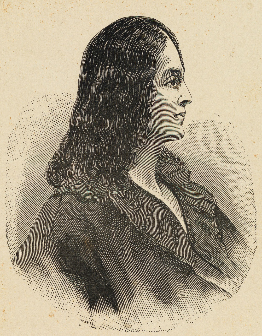 Thomaz Antonio Gonzaga: Inconfidente, Desmbargador e Poeta de "Marilia e Dirceu"